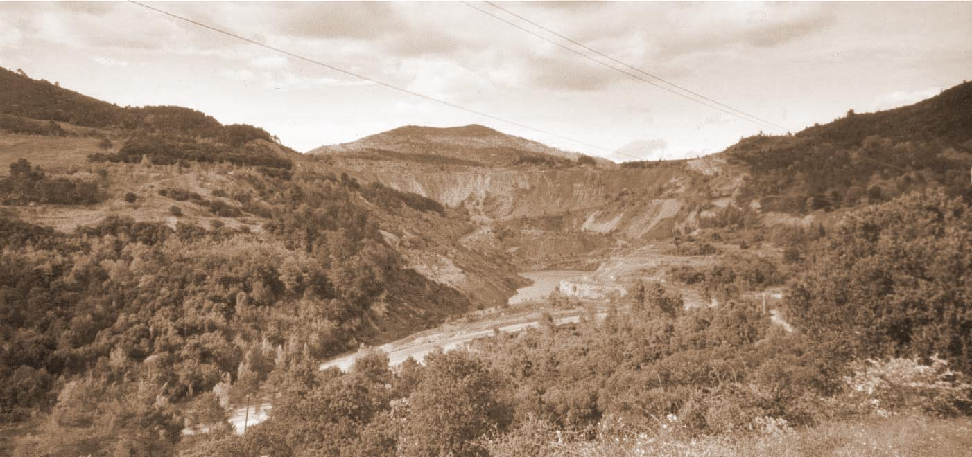 auteur: Vincent C., mine à découvert de Laval.